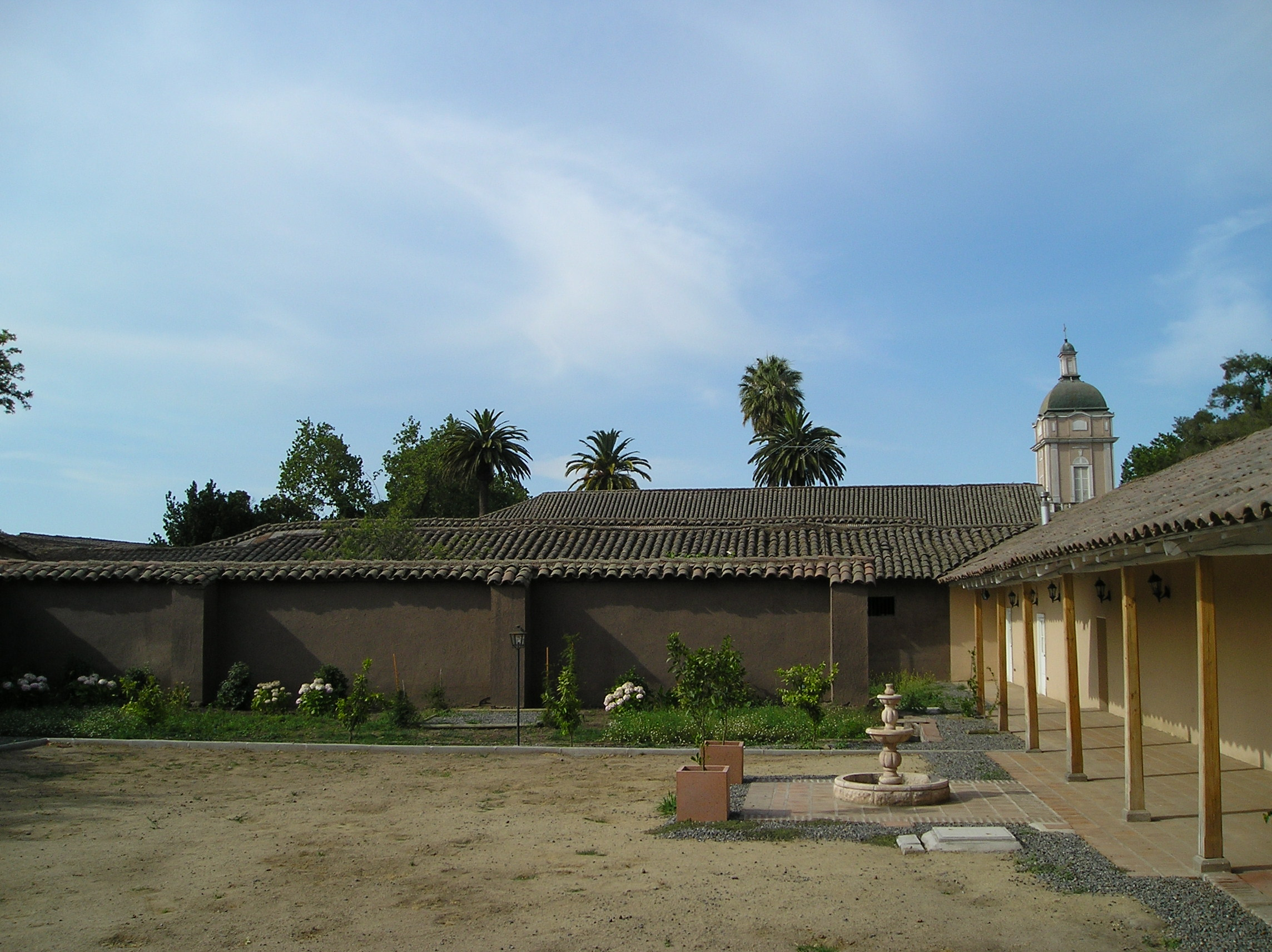 Patio hacienda el huique